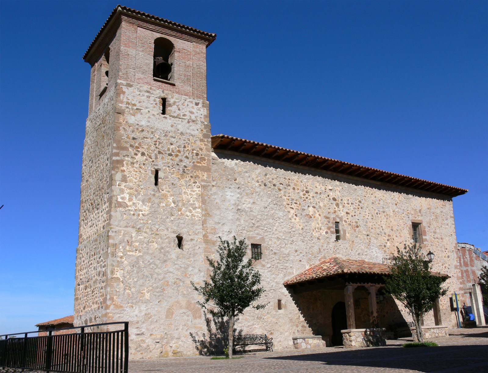 Iglesia de San Ildefonso en Castroviejo, La Rioja - España.